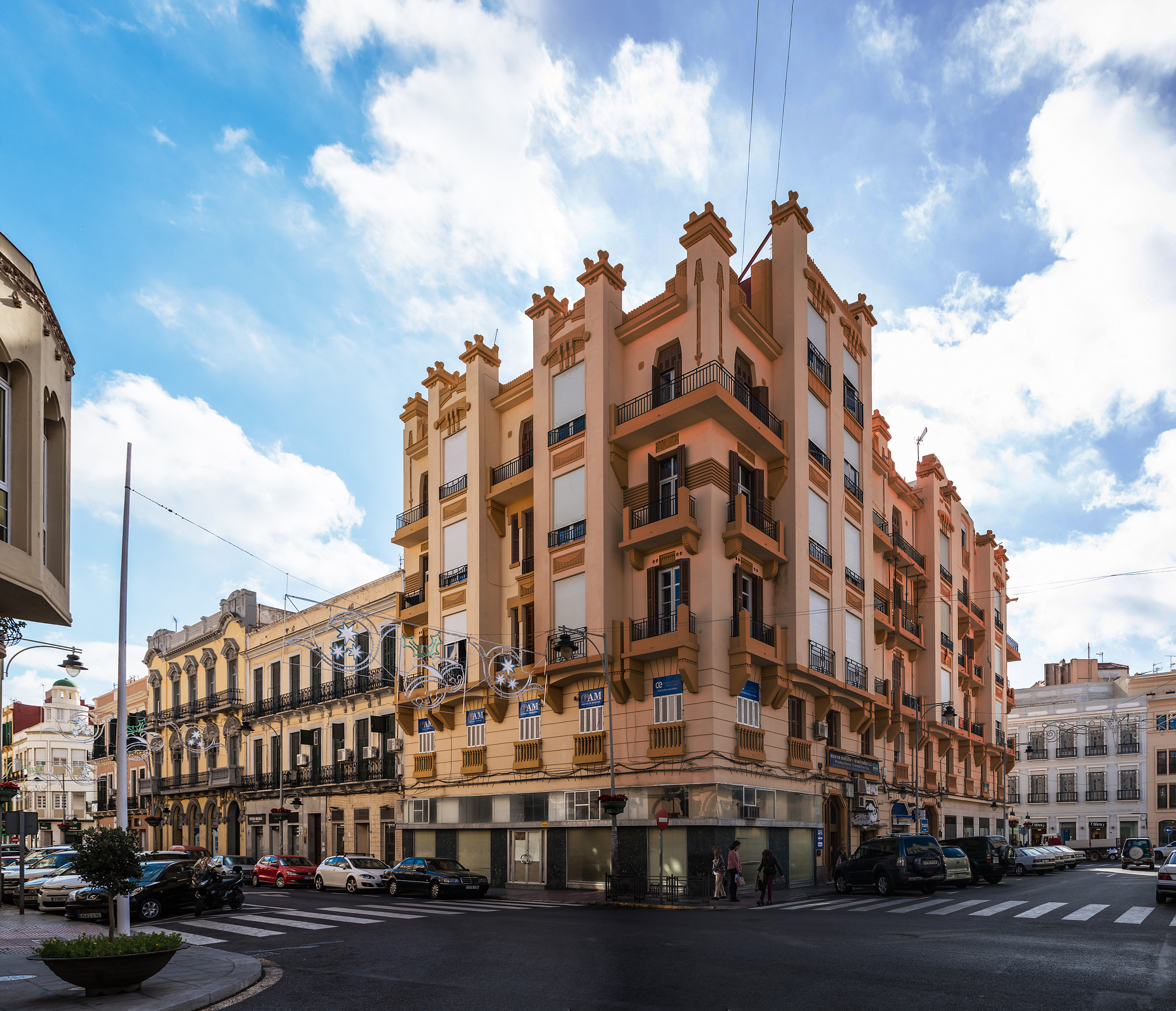 CASA DE RAFAEL RICO ALBERT. ENRIQUE NIETO 1933-1935. MELILLA (ESPAÑA). ESTILO ART DECÓ.